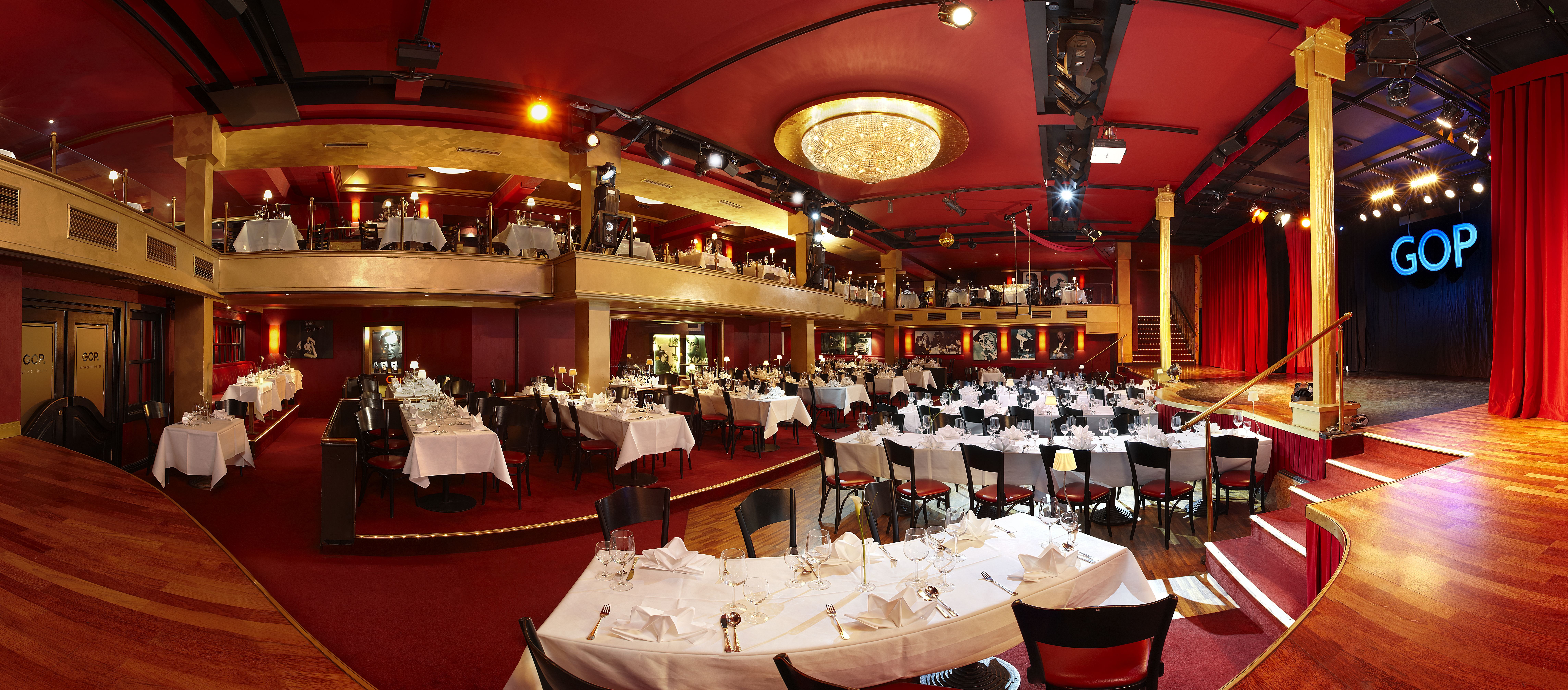 Innenansicht